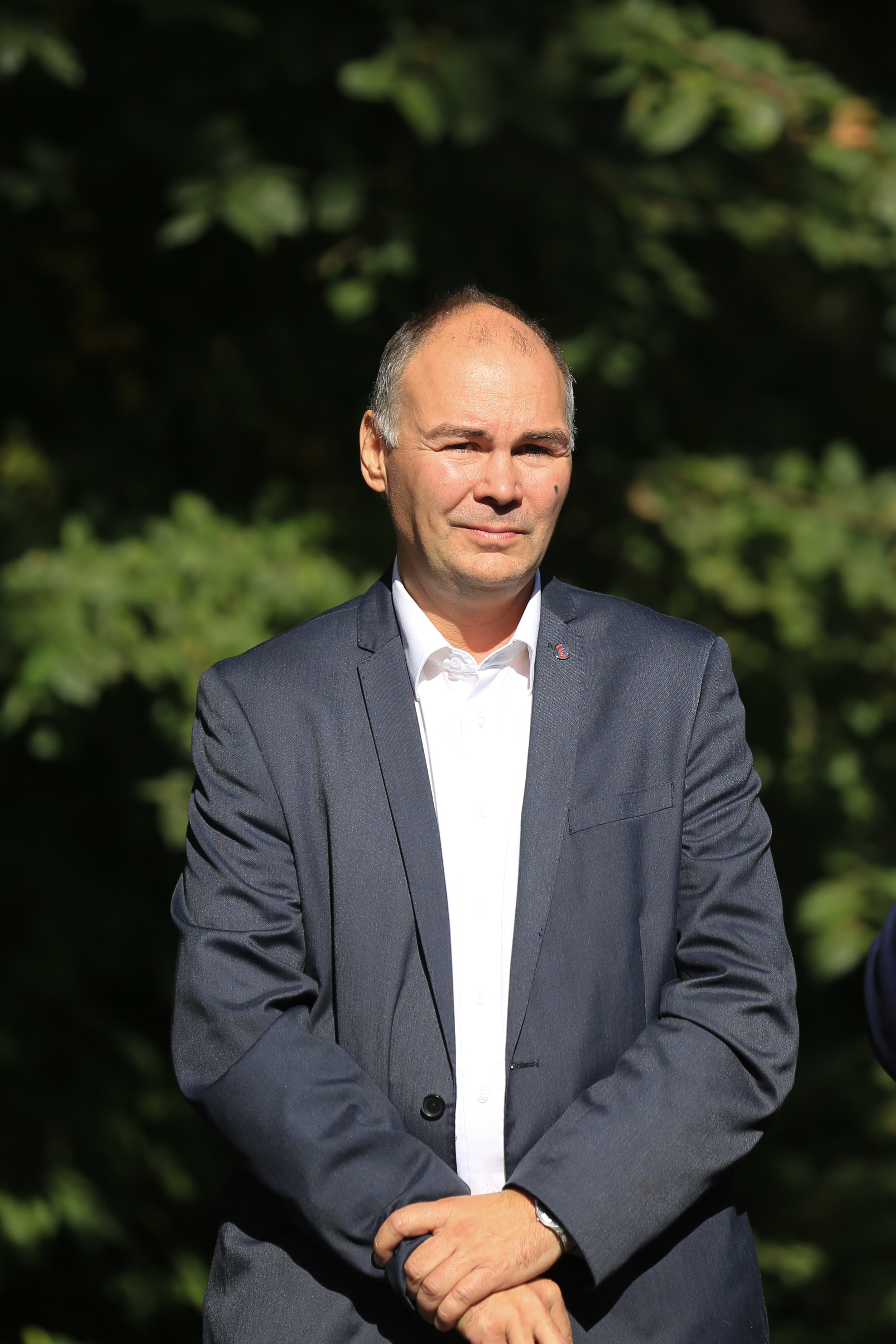 Tierparkfest der Initiative Wir wollen dasselbe - ein friedliches Köthen am 29. September 2018 in Köthen.